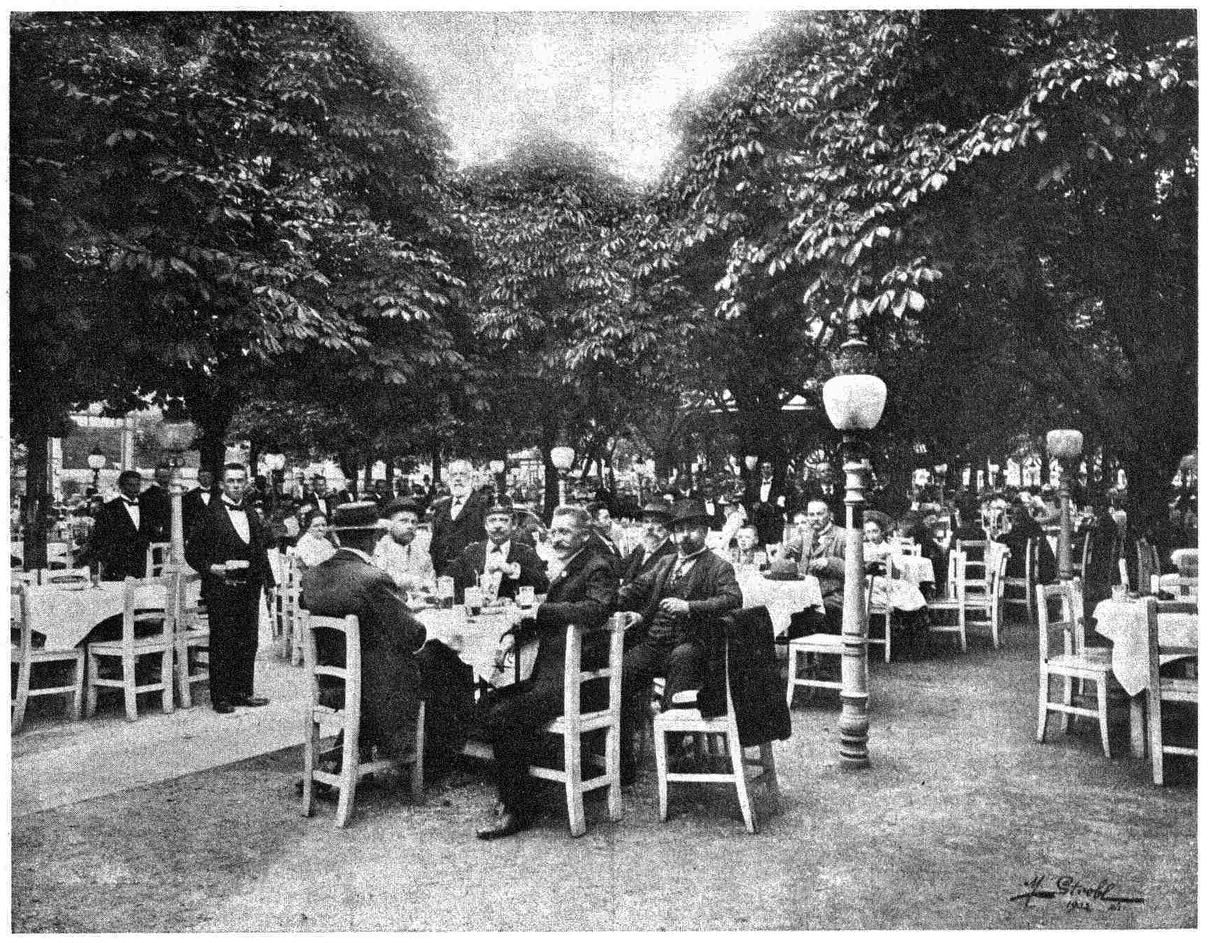 Wien-Hütteldorf, Bergmillergasse 3, Gastgarten der Hütteldorfer Brauhaus-Restauration